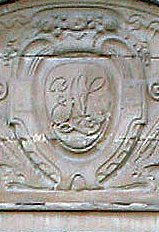 Historisches Portal des Hauses Allee 18 in Heilbronn